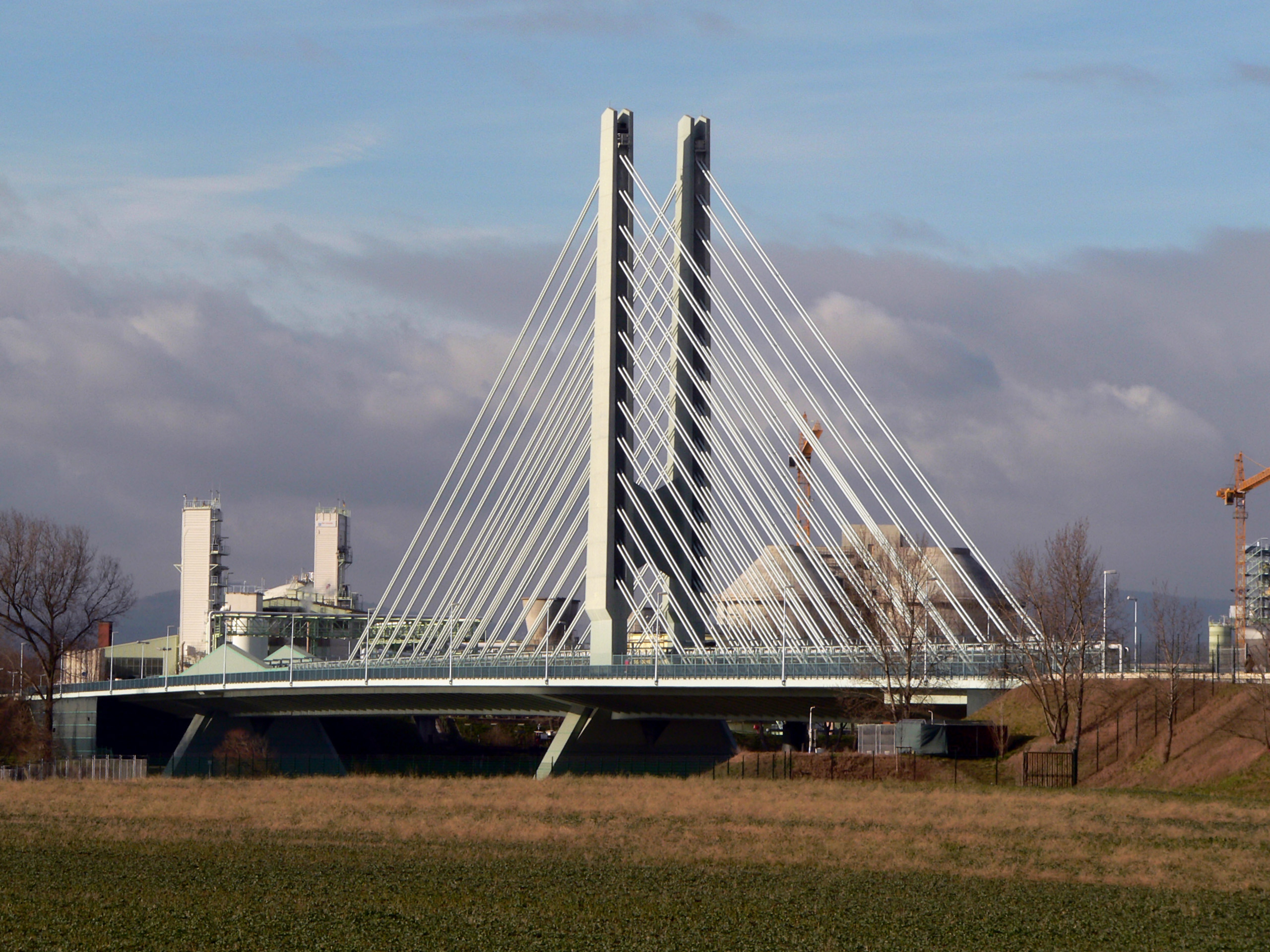 Werksbrücke West des Industrieparks Höchst, Blick von Südost